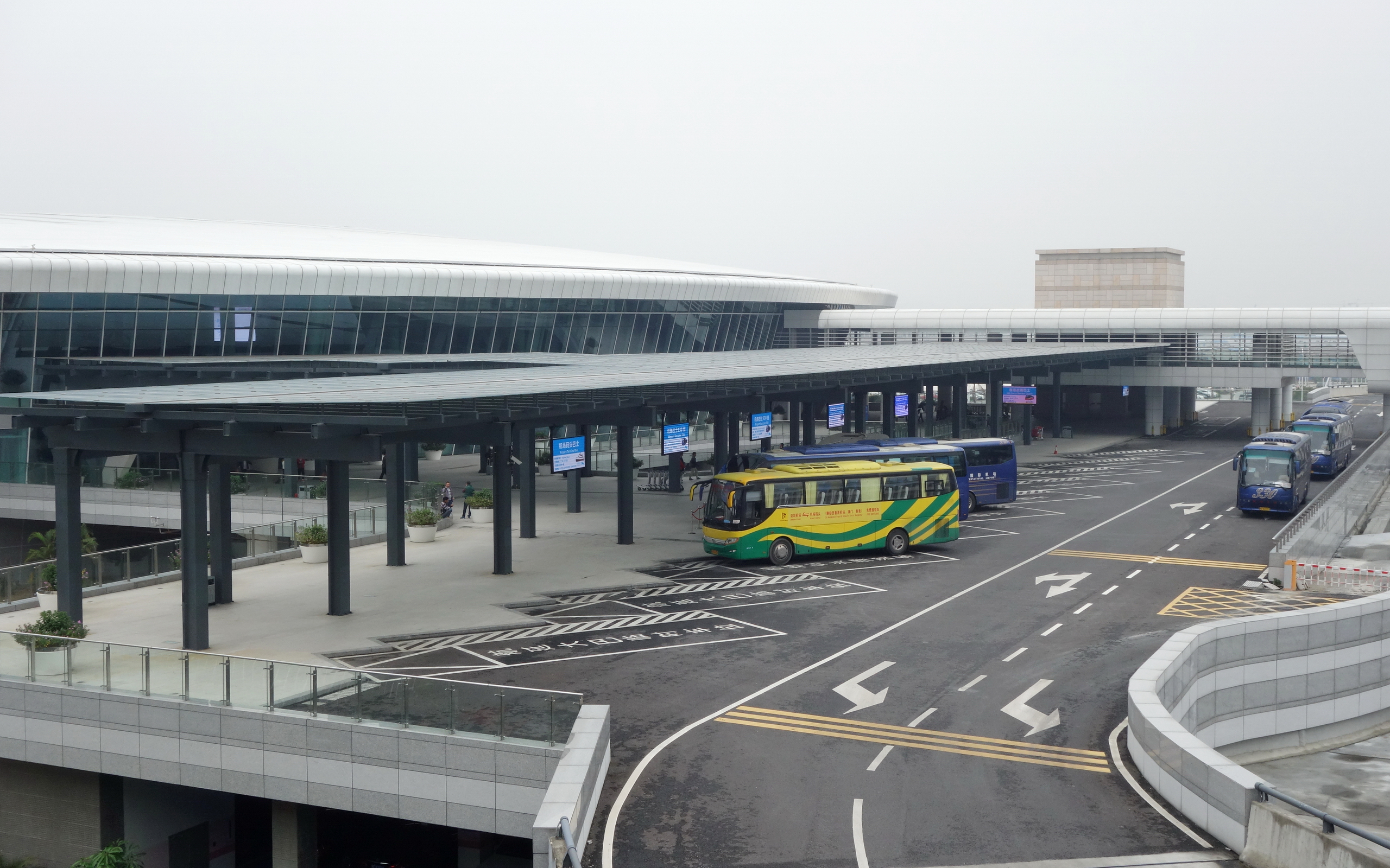 深圳宝安国际机场新航站楼前地面交通中心西侧机场巴士车站